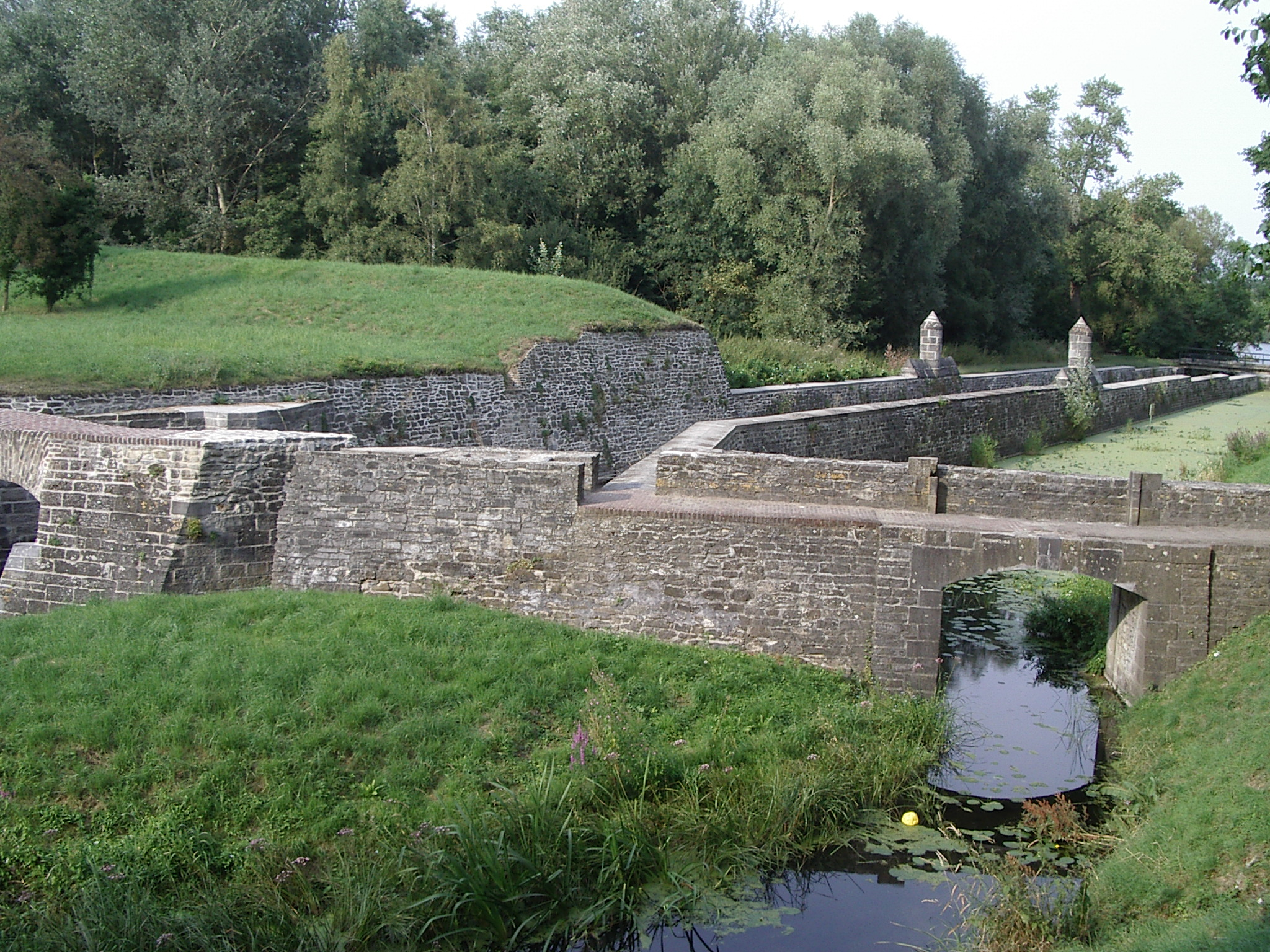 Les remparts de Condé-sur-l'Escaut